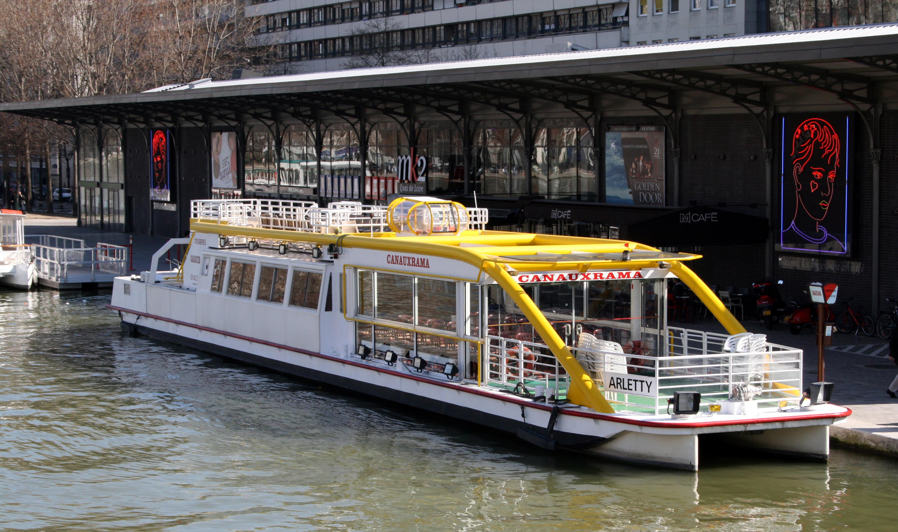 bateau de croisière Arletty (Canauxrama) sur le bassin de la Villette, devant le cinéma MK2 quai de Loire.